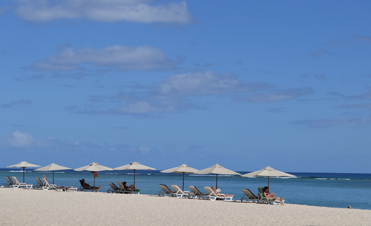 Napozók Flic-en-Flac-on.